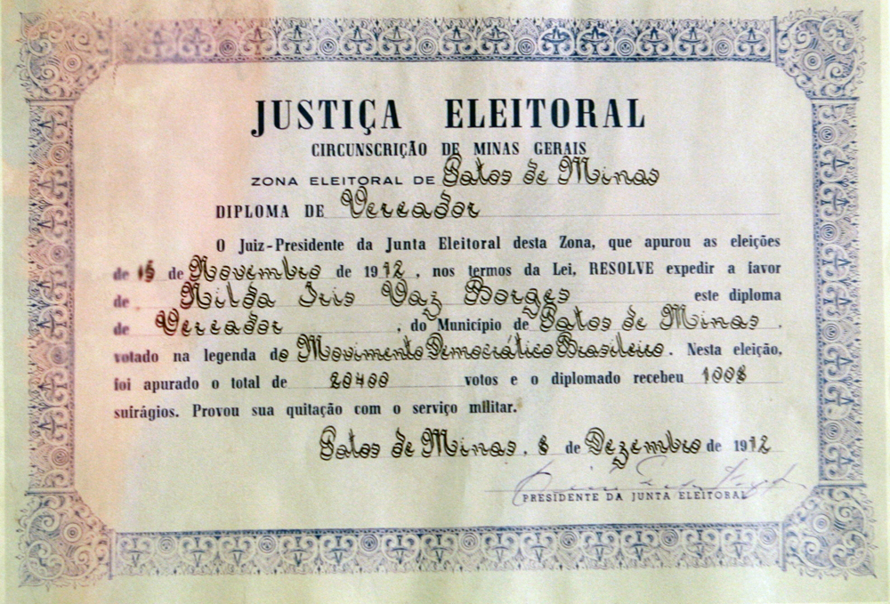 Diploma de Vereadora de Nilda Iris Vaz Borges, expedido pela zona eleitoral de Patos de Minas no ano de 1912(texto da página supra lincada - TSE)